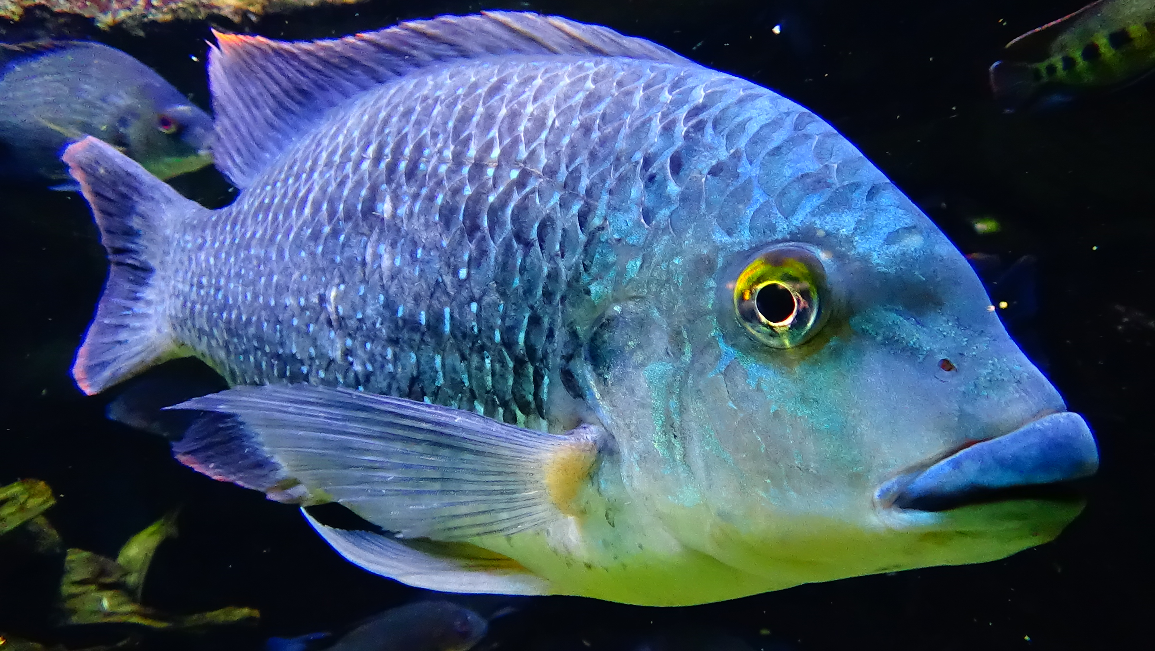 Tilapia louka - Cichlidae - Aquarium tropical du palais de la porte dorée - Paris, ile de France, France - 12/2014